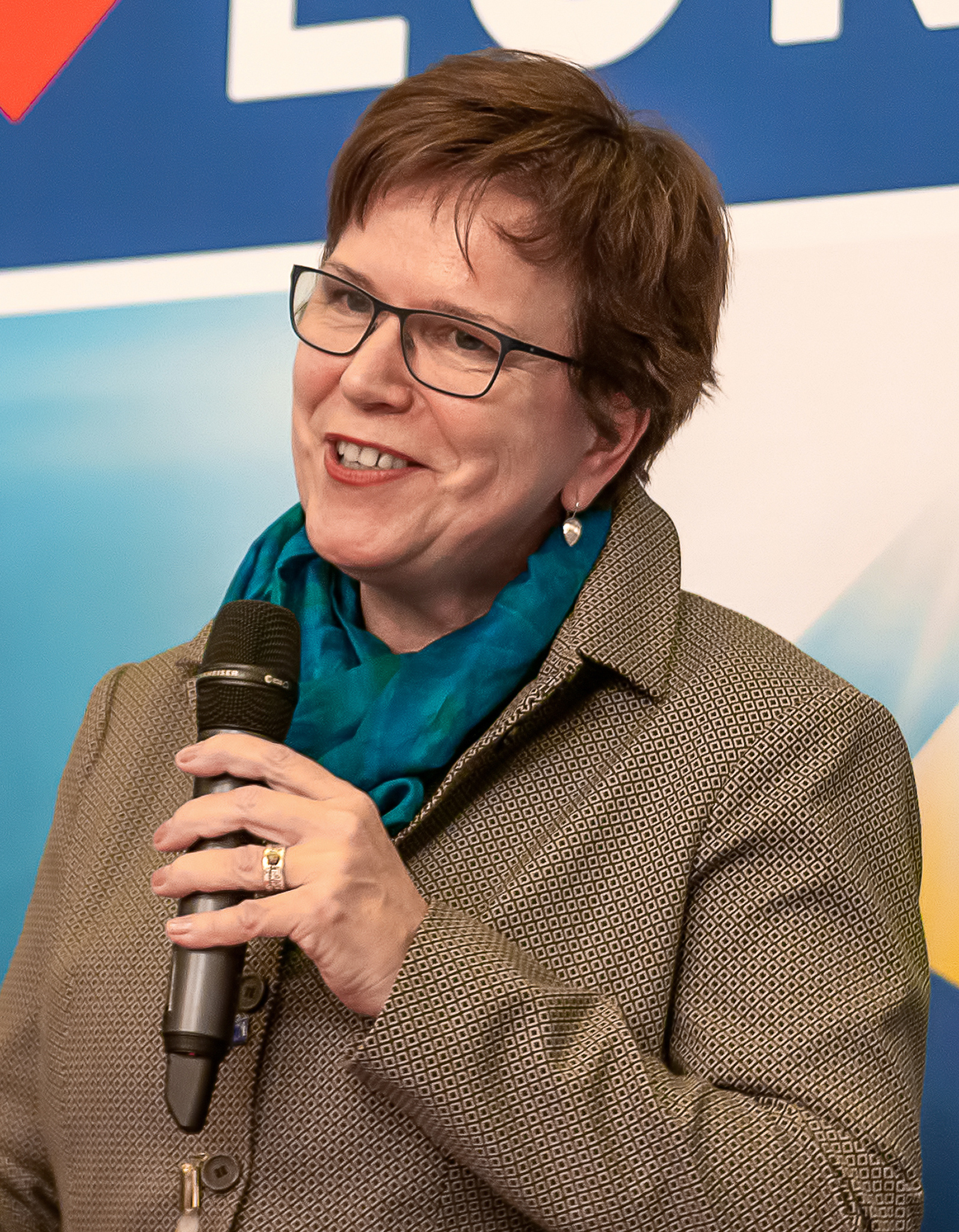 Gabriele Bischoff im Rahmen einer SPD-Mitgliederveranstaltung, Januar 2019